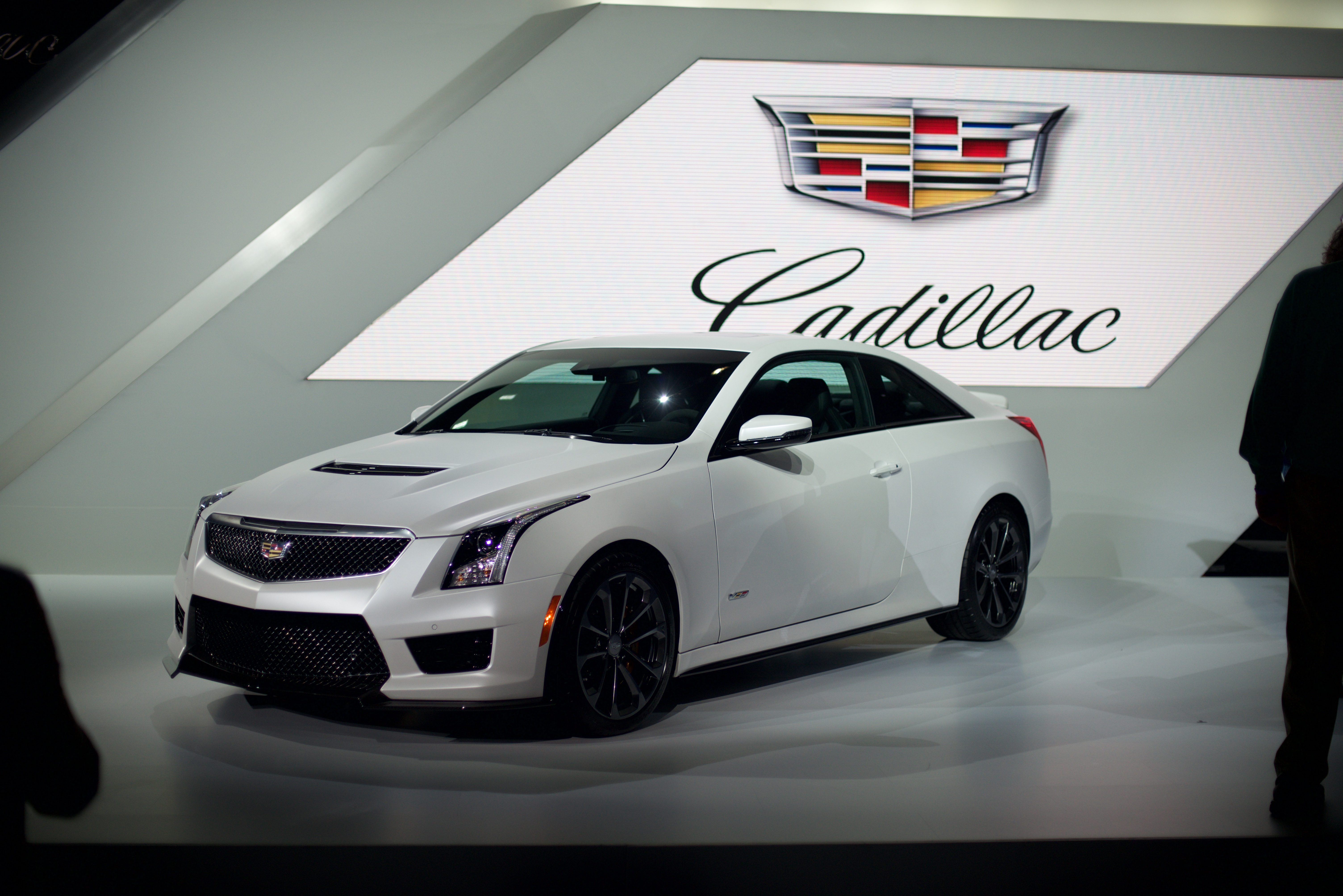 SLY_5733